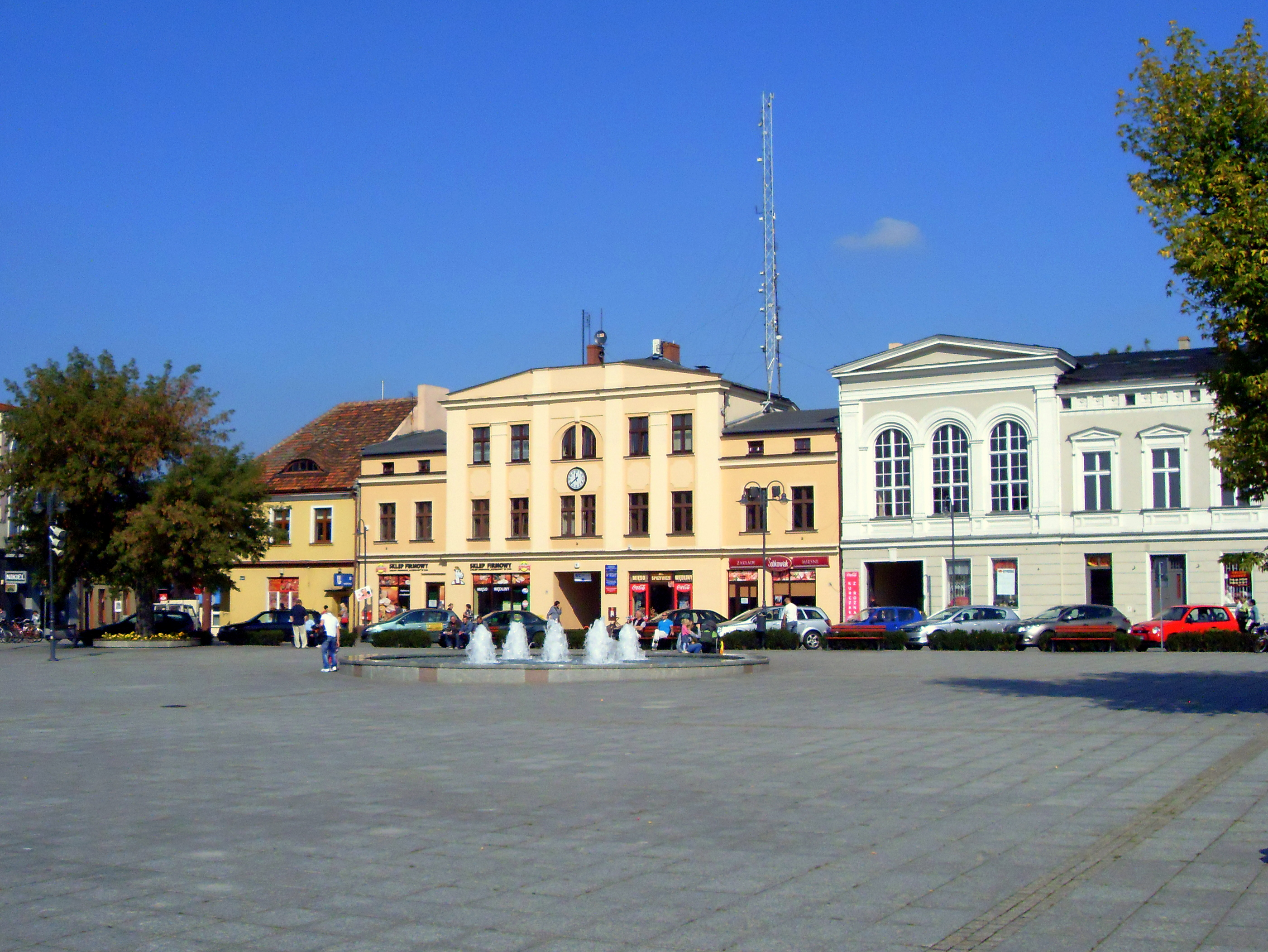 Rynek z fontanną w Wągrowcu